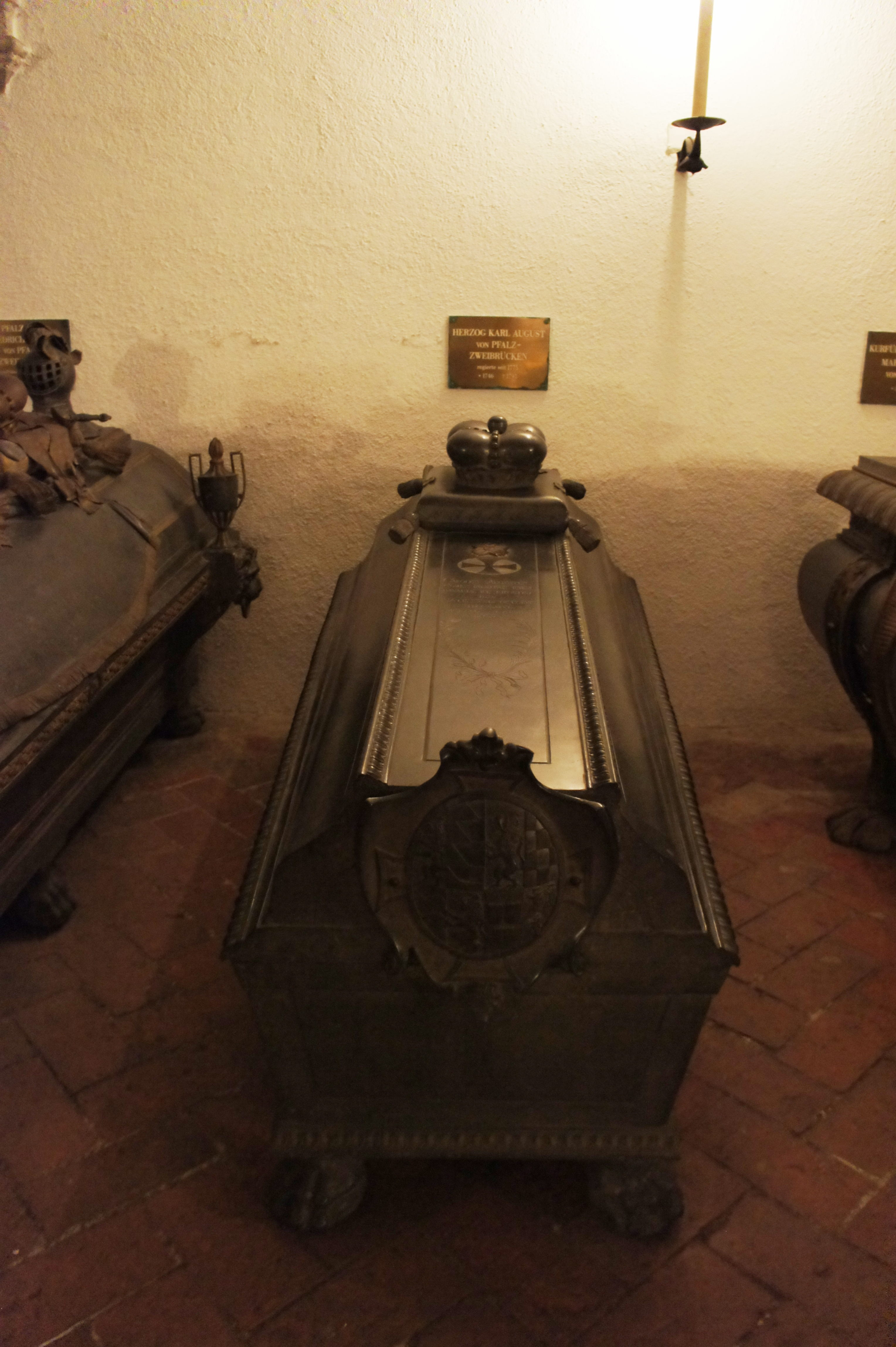 Herzog Karl August von Zweibrücken (29. Oktober 1746 – 1. April 1795). Sarkophag in der Grablege der Wittelsbacher in der St. Michael Kirche in München.